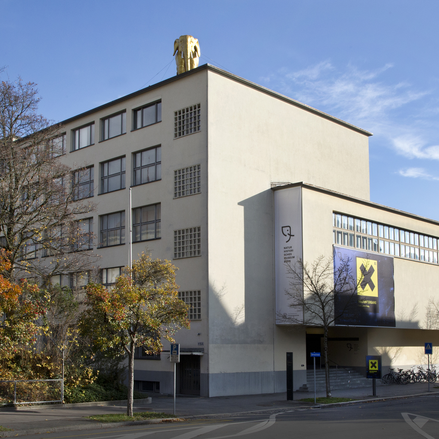 Das Naturhistorische Museum Bern mit dem goldenen Elefanten Caruso auf dem Dach.